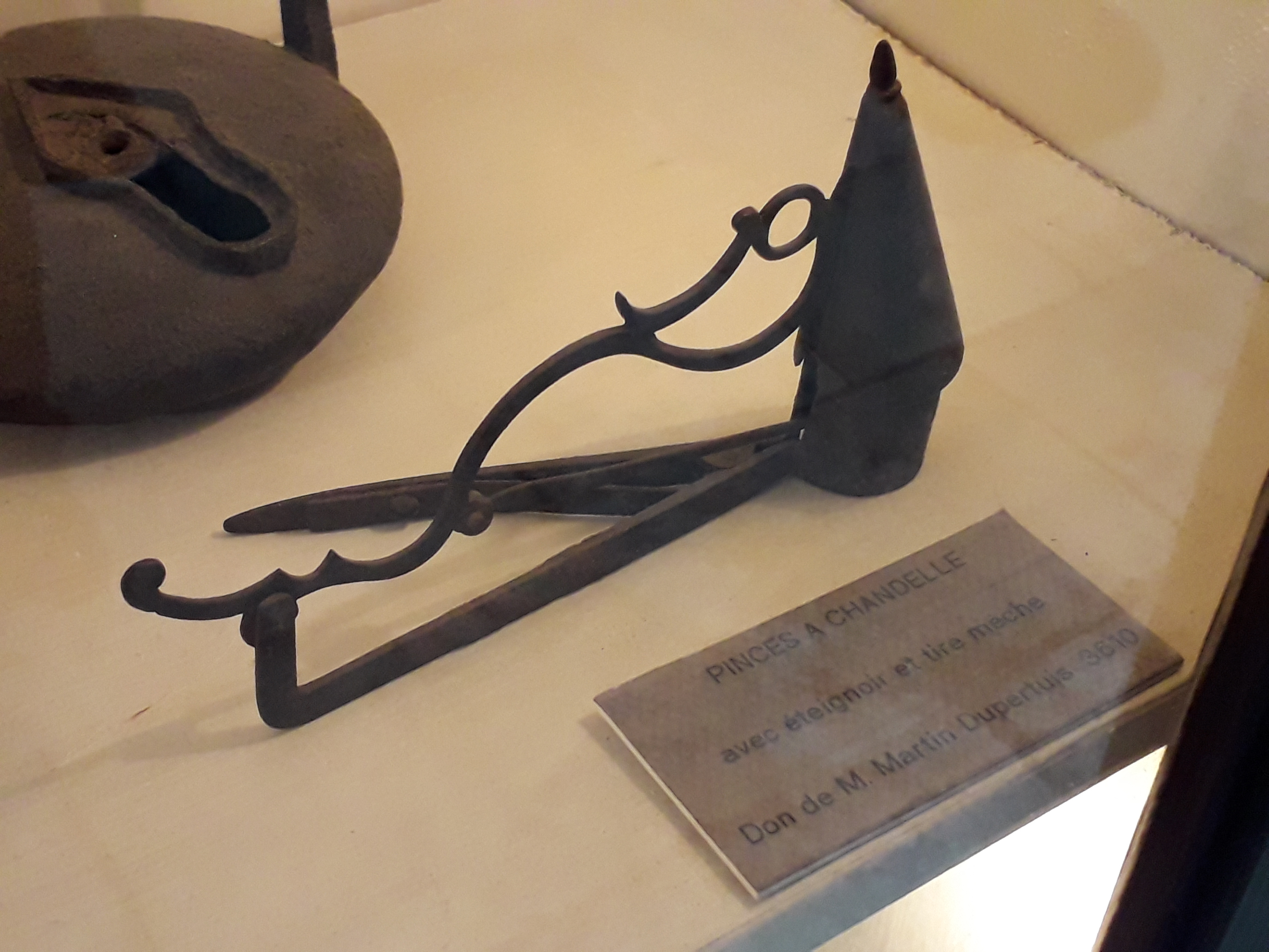 Pinces à chandelle avec éteignoir et tire-mèche. Berry (France), sans date (sans doute XIXe ou XXe siècle). Musée Bertrand, à Châteauroux, dans l'Indre, en France. Don de M. Martin Dupertuis. Inv. 3610. Exposé dans une salle reconstituant une cuisine berrichonne traditionnelle (XIXe-XXe siècles).